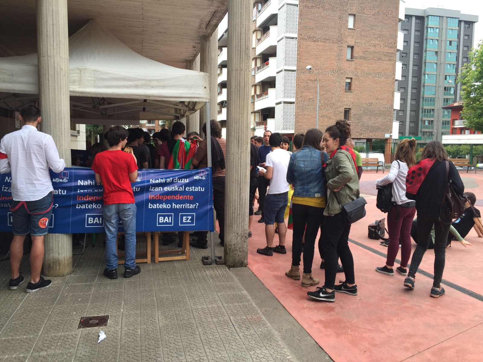 Gazteak bozkatzen Azpeitiako independentziari buruzko erreferendumean